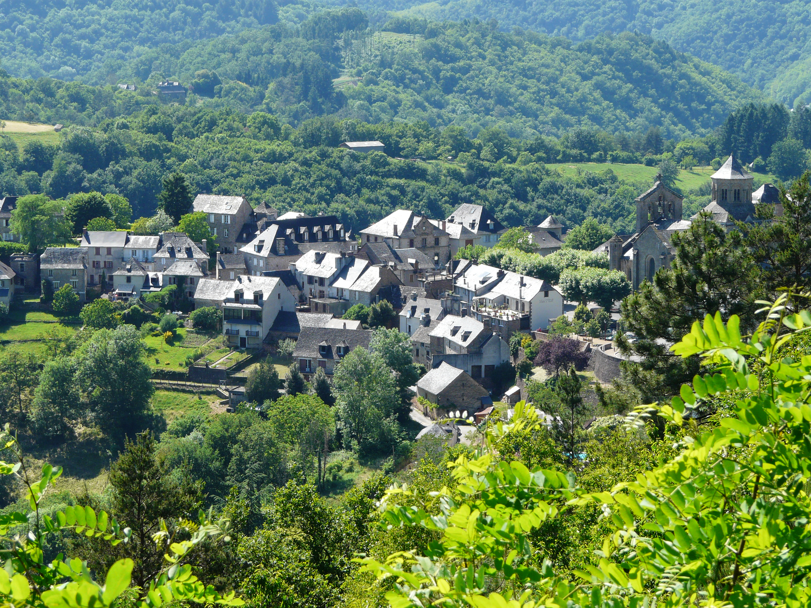 Le bourg d'Aubazine vu depuis le sud-sud-est, Corrèze, France